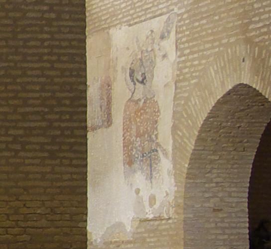 Monasterio de Santa Clara. Detalle de pintura "Mural de San Cristóbal" de 2,5 metros de altura.